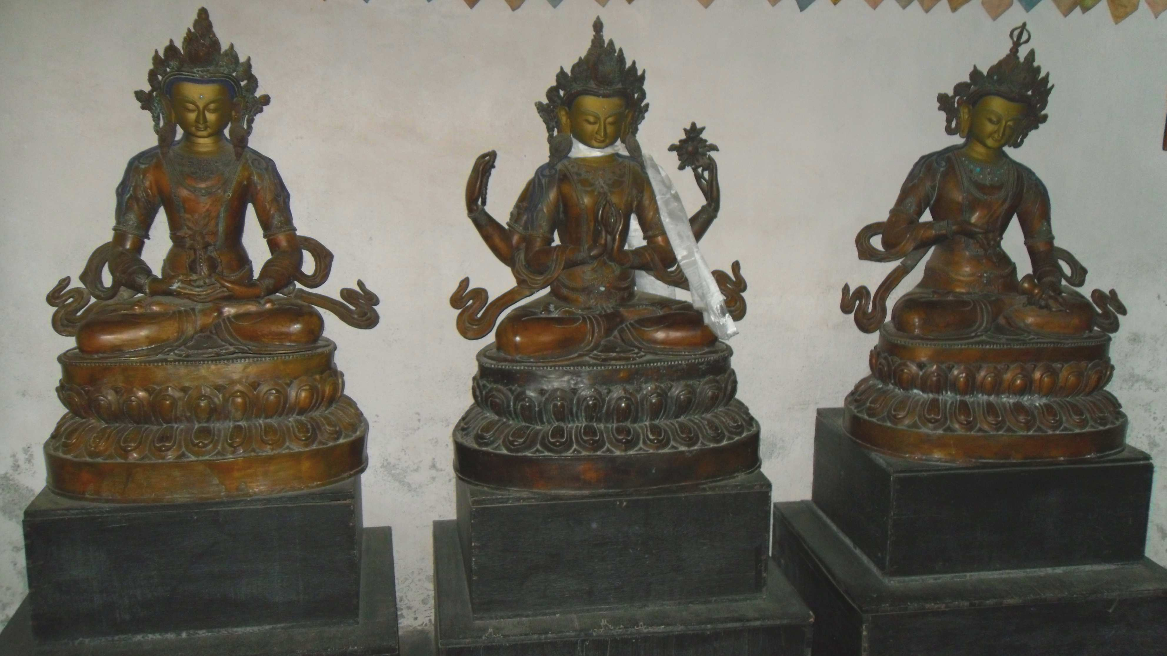 Ausstellungsstücke vom Messner Montain Museum auf Schloss Juval